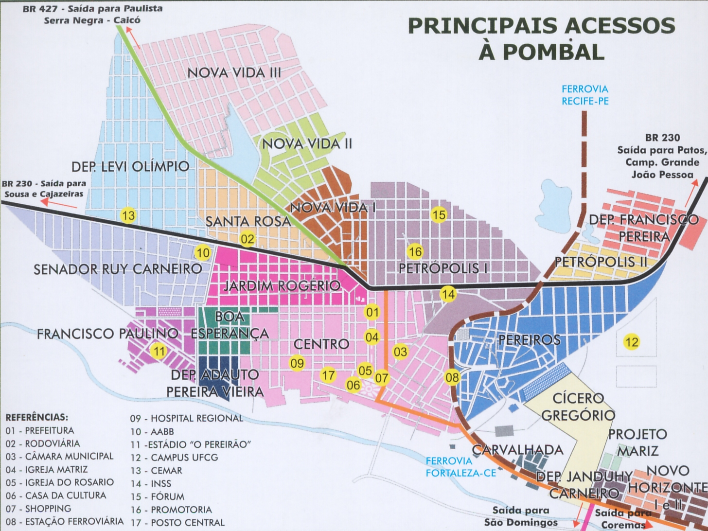 Mapa com todos os bairros da cidade de Pombal, no estado da Paraíba - Brasil.